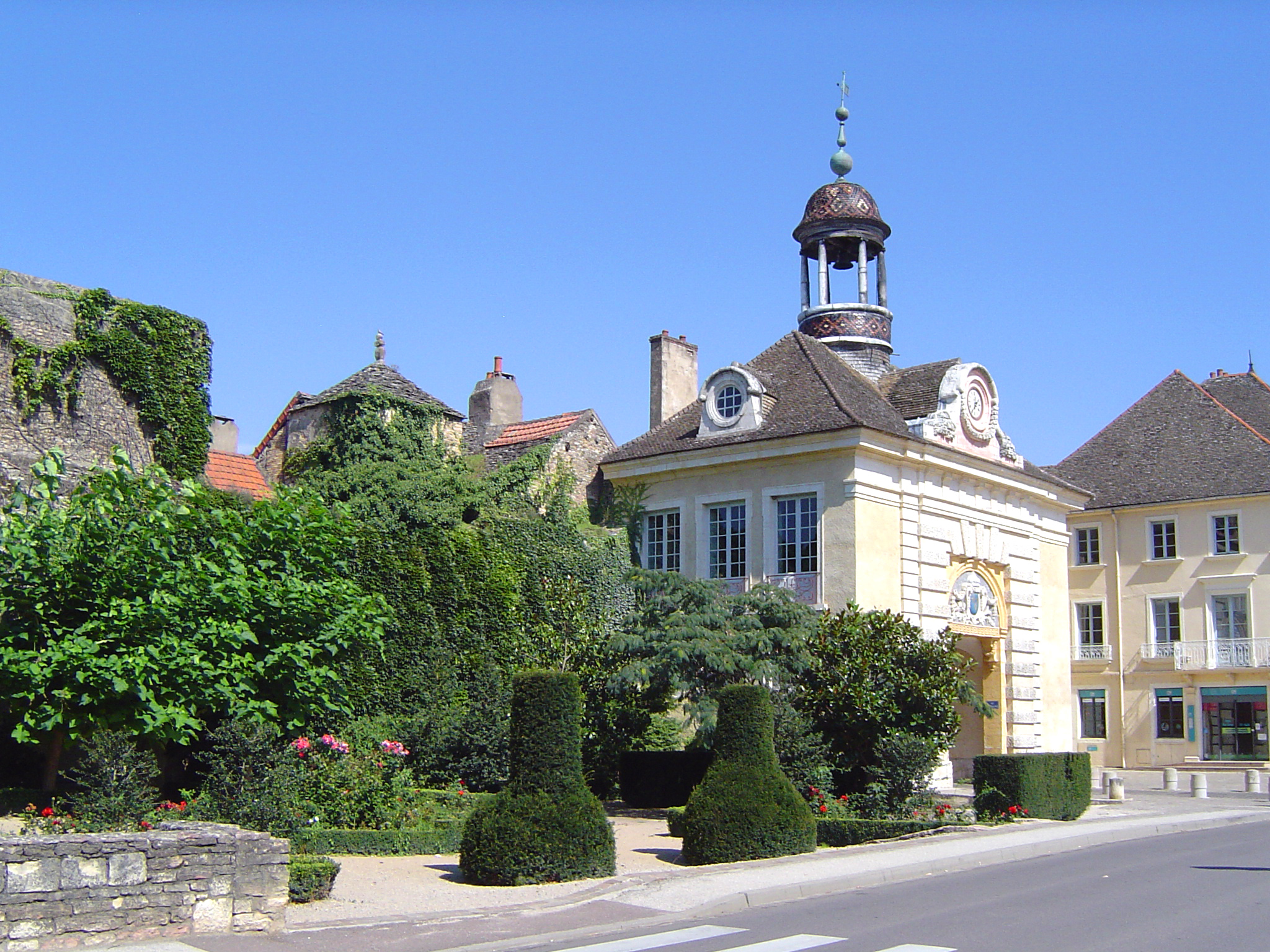 Givry (Saône et Loire) mairie porche hôtel de ville